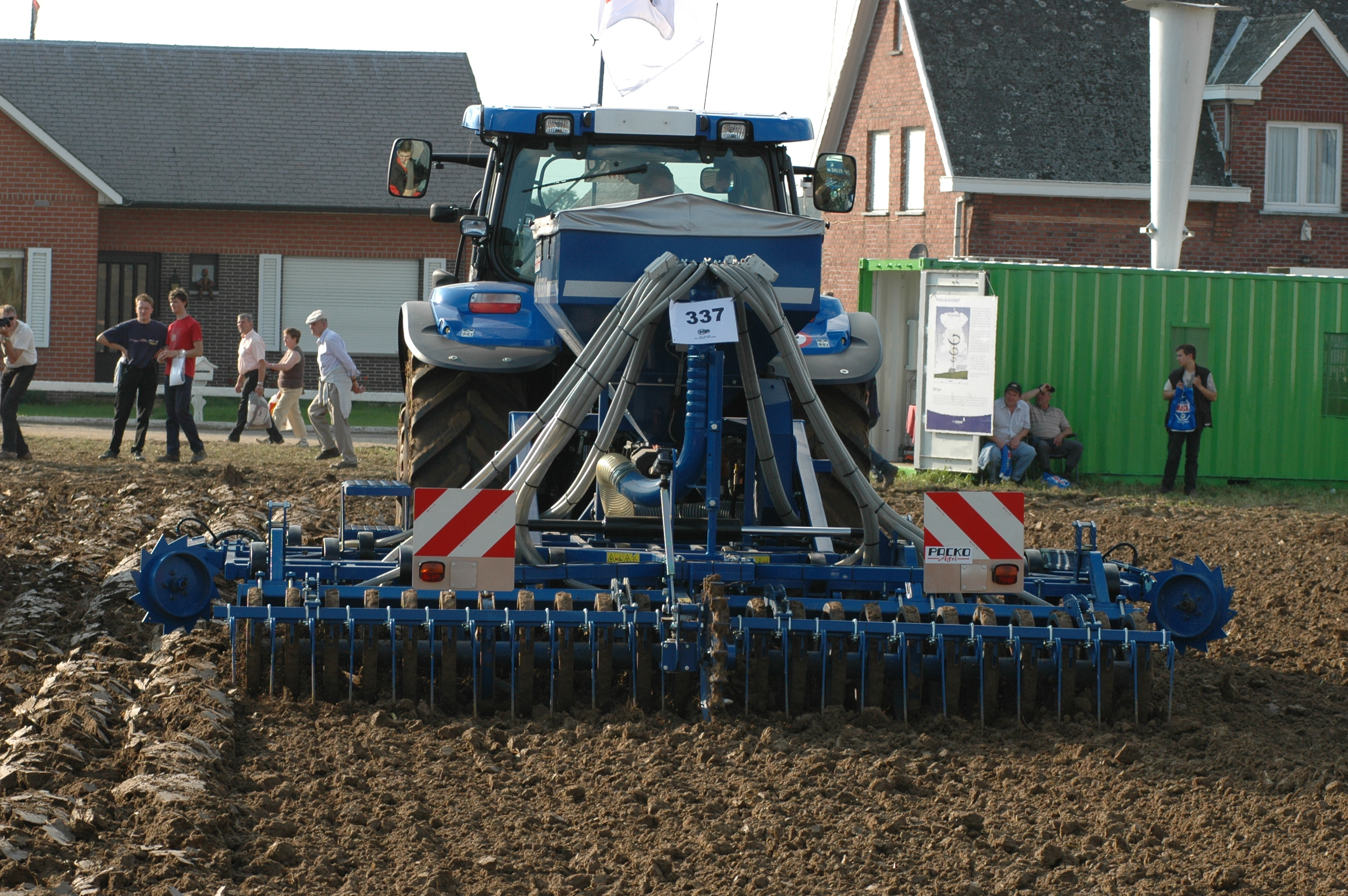 Zinkensämaschine Triathlon von Köckerling mit 4 m Arbeitsbreite, Werktuigendagen 2007